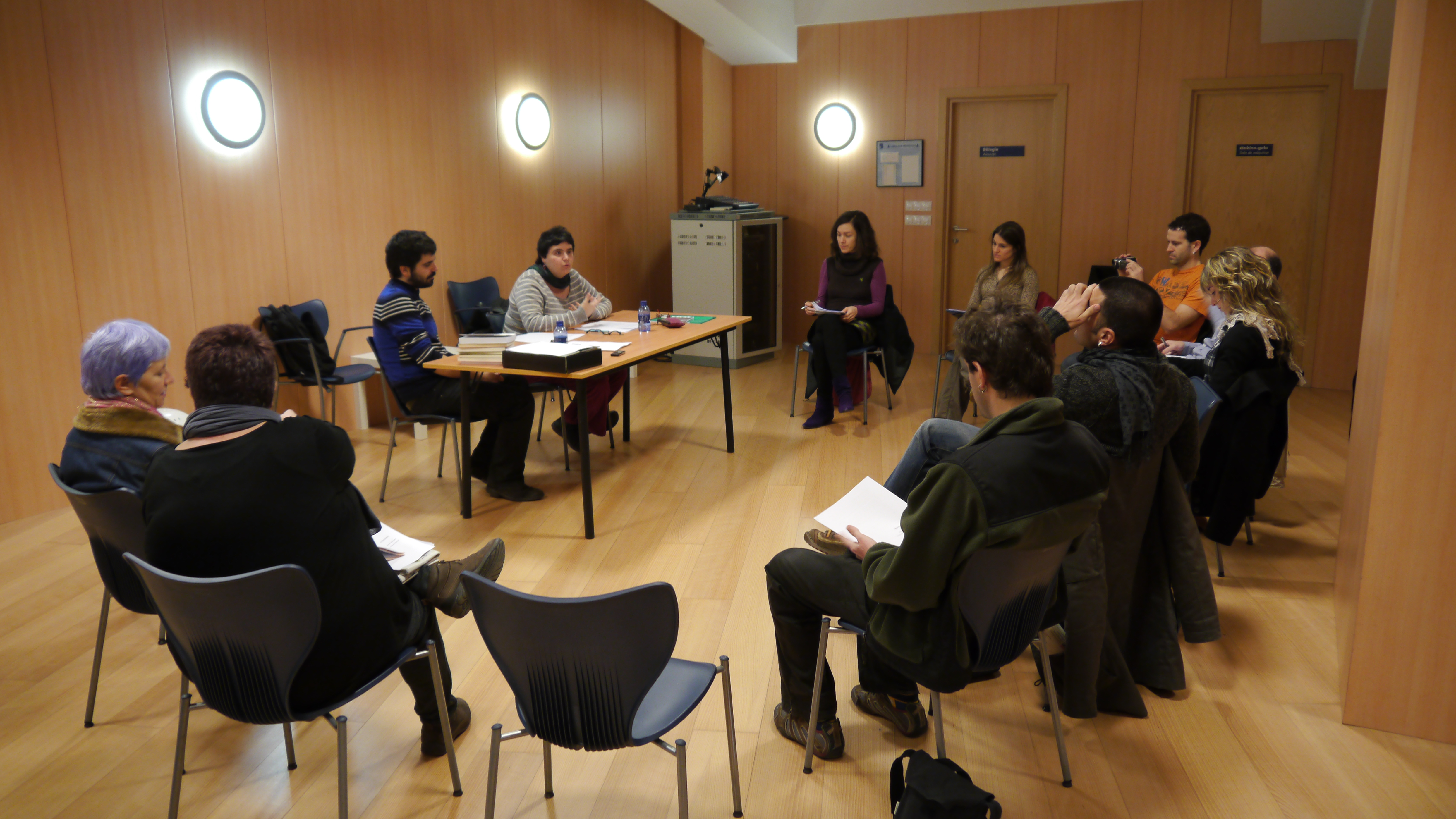 Iratxe Retolaza 2011an. Data: 2011-03-19; Lekua: Ernest Lluch kultur etxea, Donostia; Gaia: Queer literatura; Hizlariak: Ibon Egaña eta Iratxe Retolaza